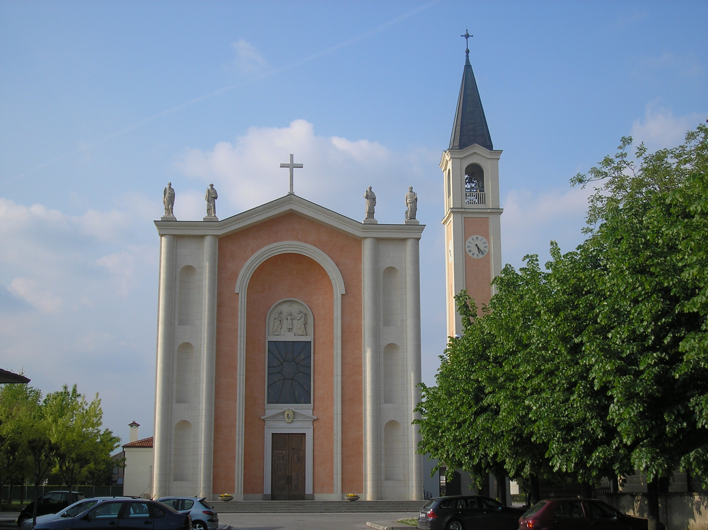 chiesa